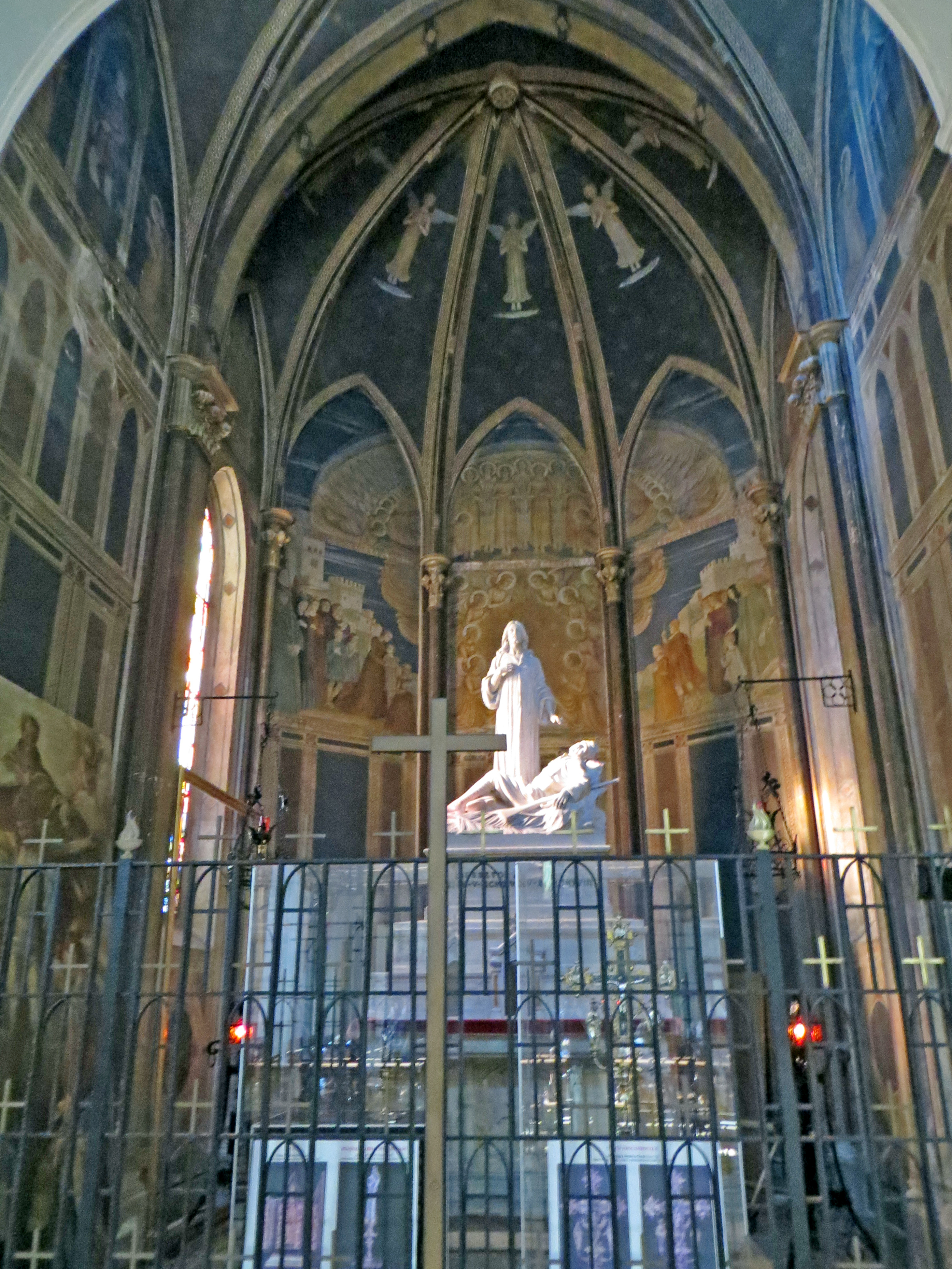 Collegiata di San Bartolomeo Apostolo (Busseto) - cappella dei caduti della Grande Guerra